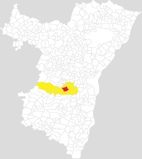 Communauté de communes de la région de Molsheim-Mutzig